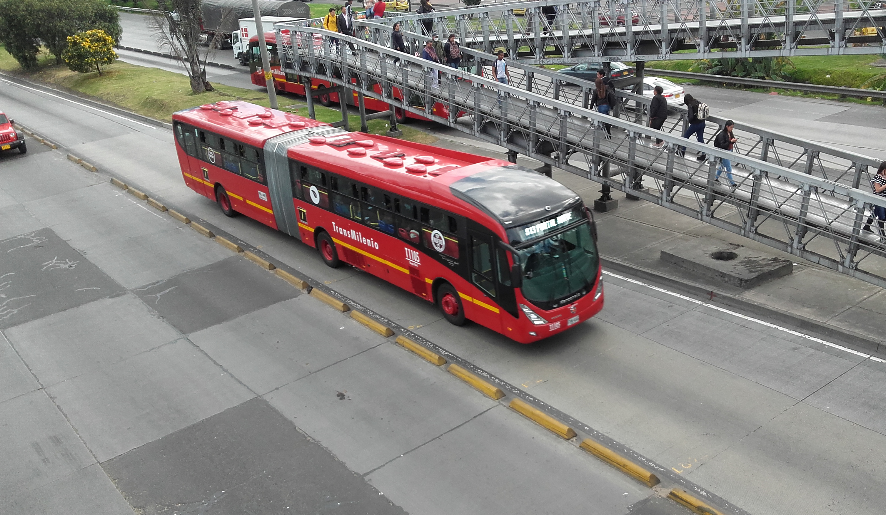 ndndndndj